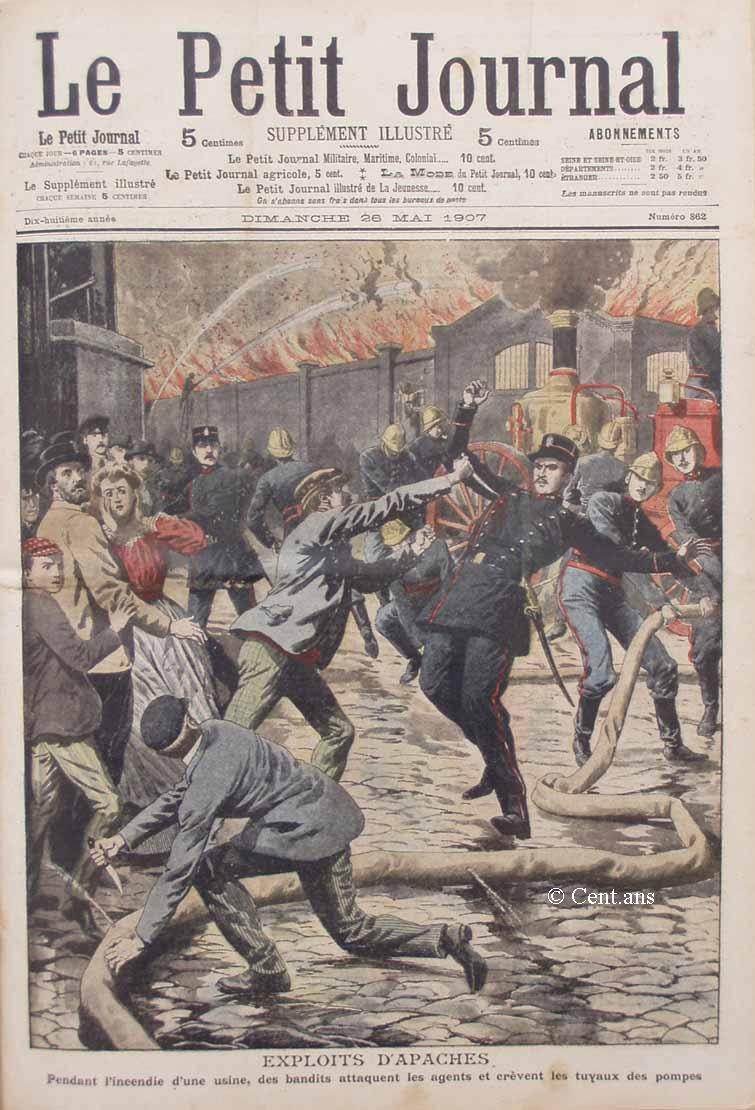 Pendant l' incendie d' une usine des bandits attaquent les agents et crèvent les tuyaux des pompes Français cadien: Pendant l' incendie d' une usine des bandits attaquent les agents et crèvent les tuyaux des pompes